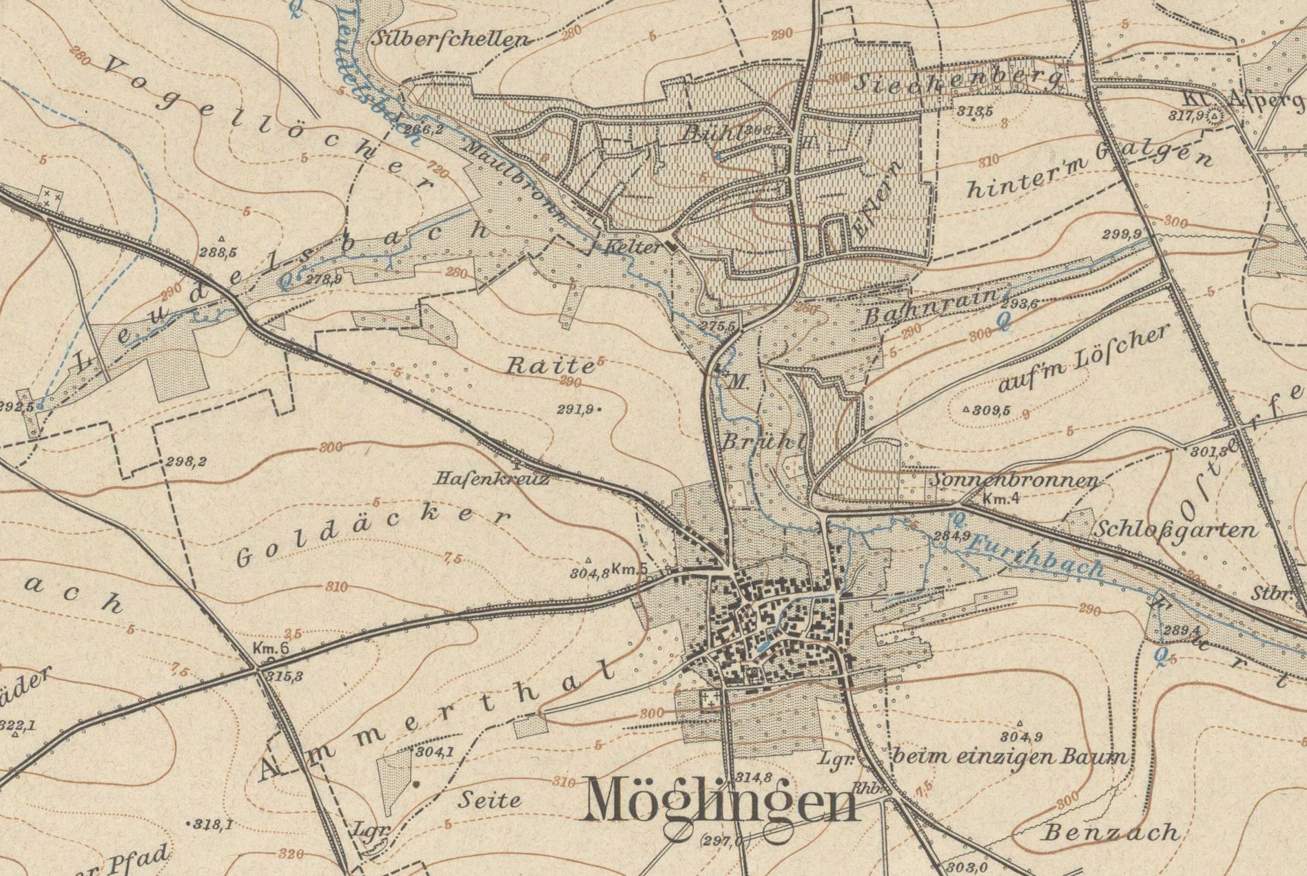 Möglingen auf einem Ausschnitt der Topographischen Karte 7120 (Leonberg) von 1896, Maßstab 1:25.000. Quellgebiet des Oberen und Unteren Leudelsbachs mit Zuflüssen